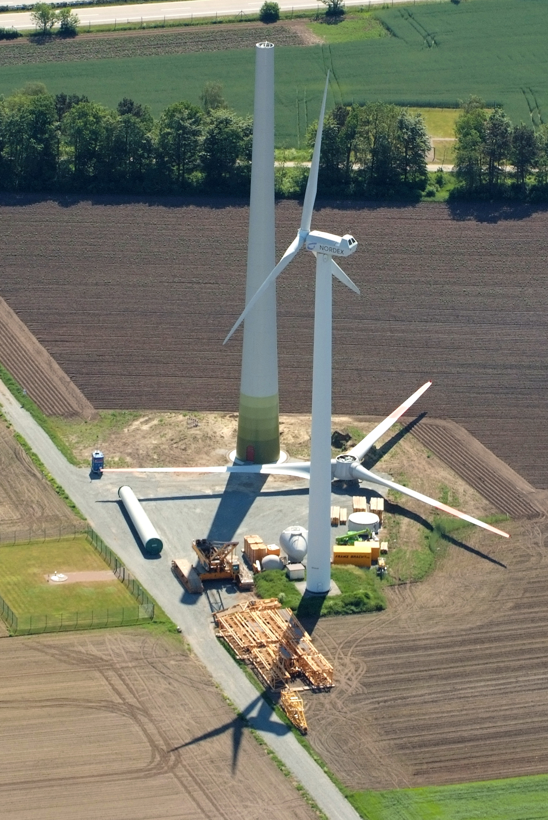 Fotoflug vom Flugplatz Nordholz-Spieka über Cuxhaven und Wilhelmshaven